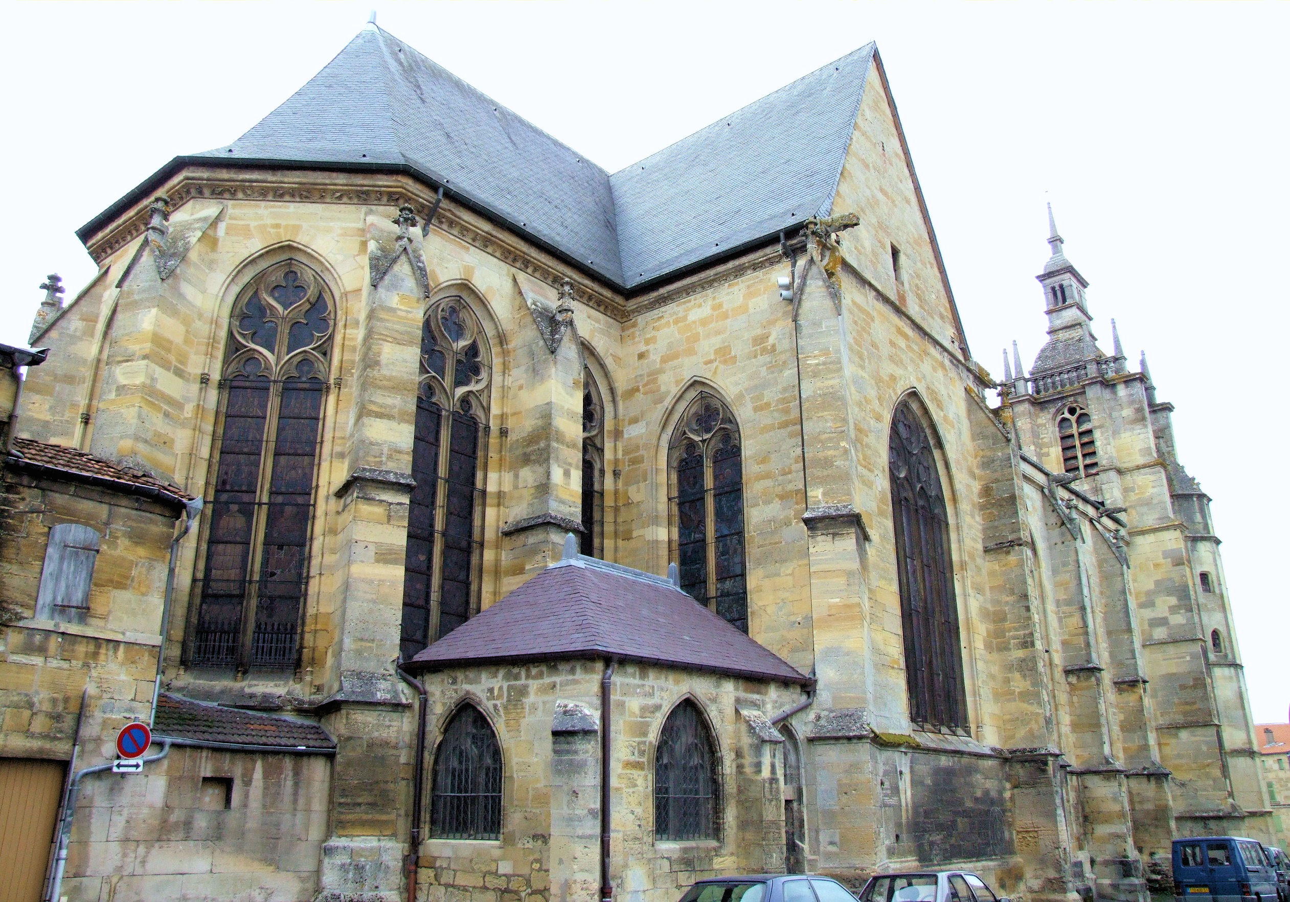 Bar-le-Duc - Eglise Saint-Etienne vue du chevet